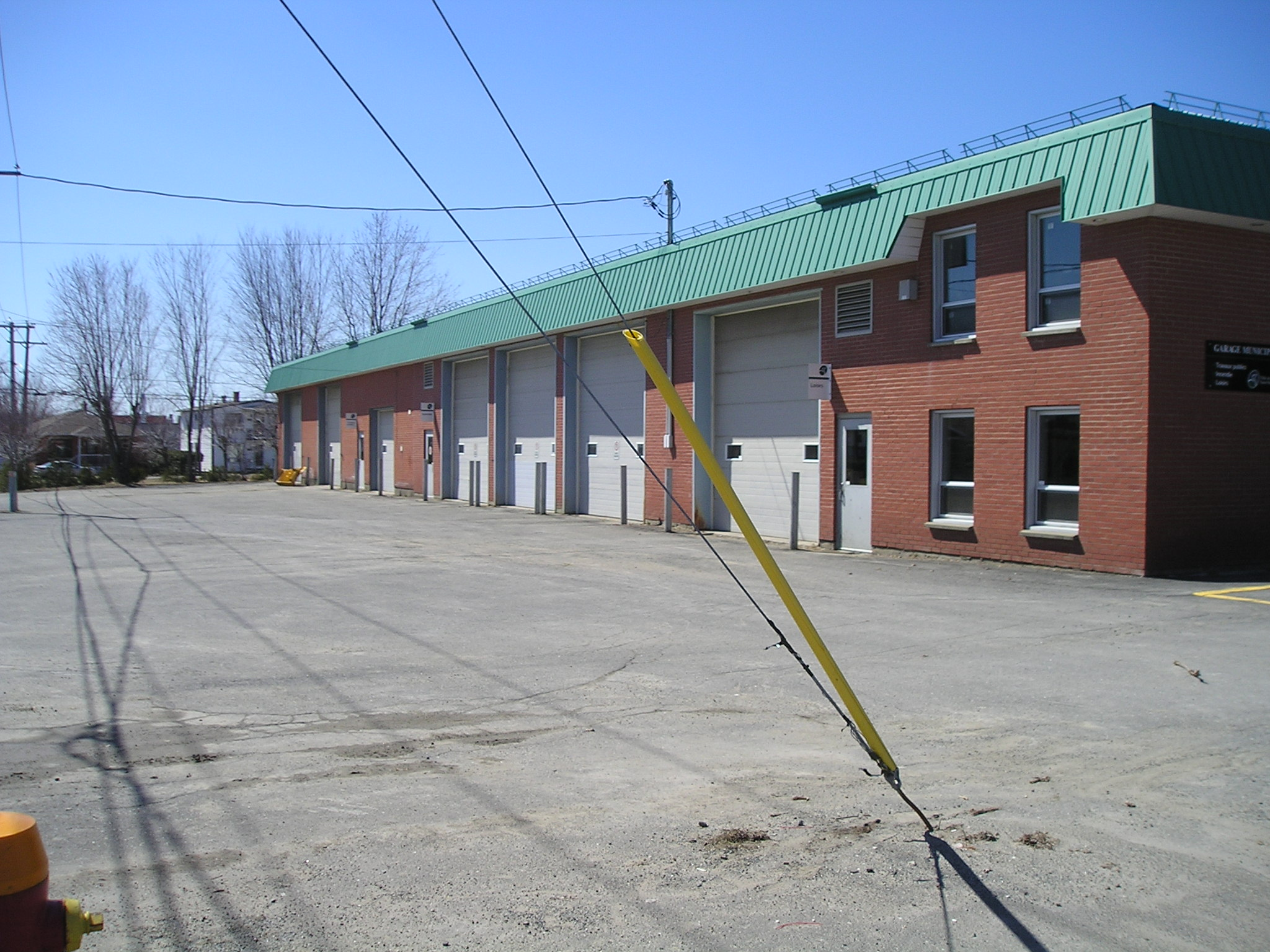 Garage municipale de la Ville Saint-Nicéphore qui comprend les pompiers avec eux